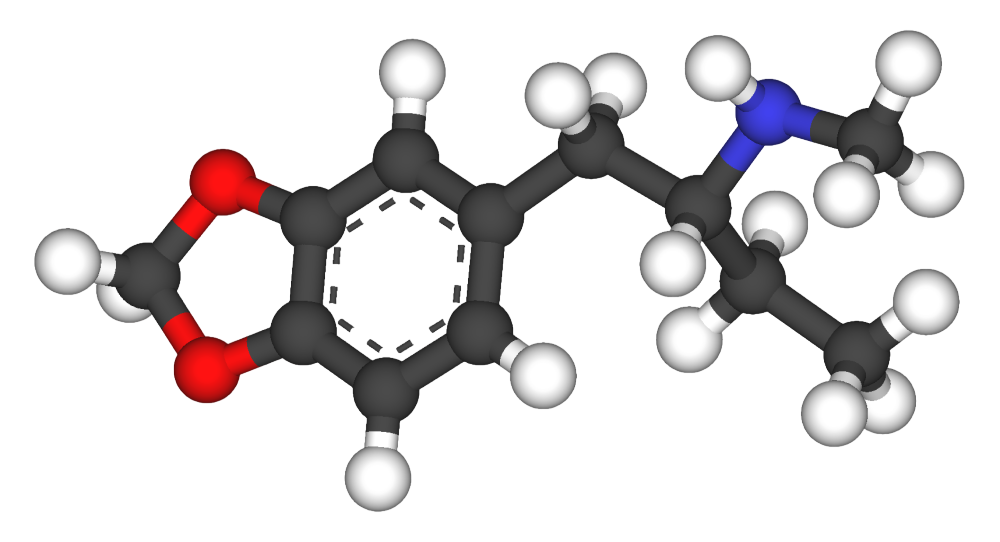 MBDB